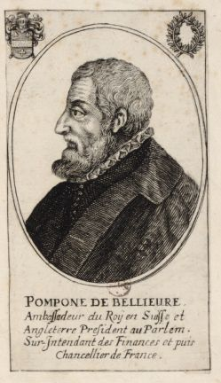 Estampe représentant Pomponne de Bellièvre, ambassadeur du roi de France en Suisse. L'original est conservé à la BNF.